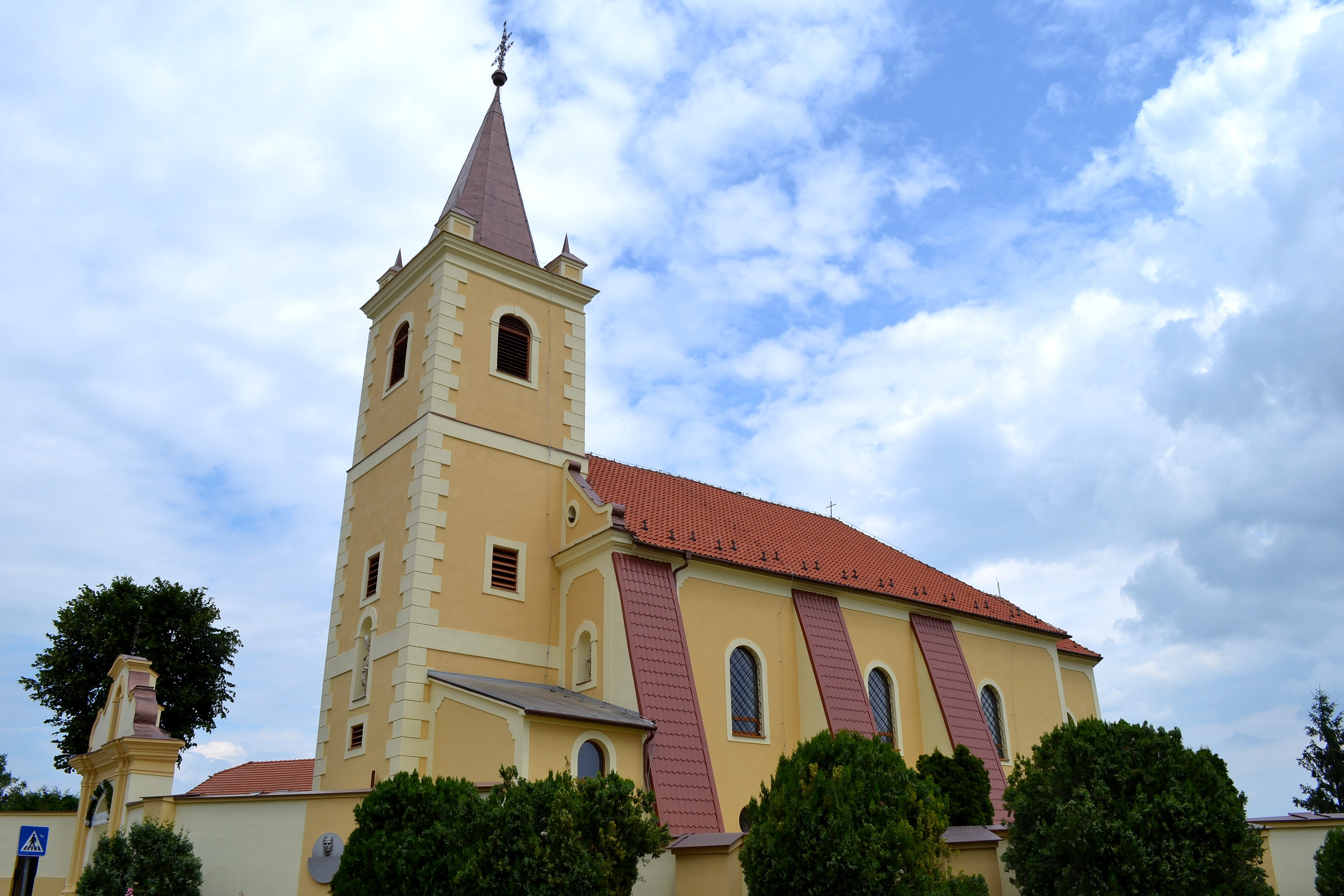 Blatné (okr. Senec), Kostol svätého Vojtecha; celkový pohľad